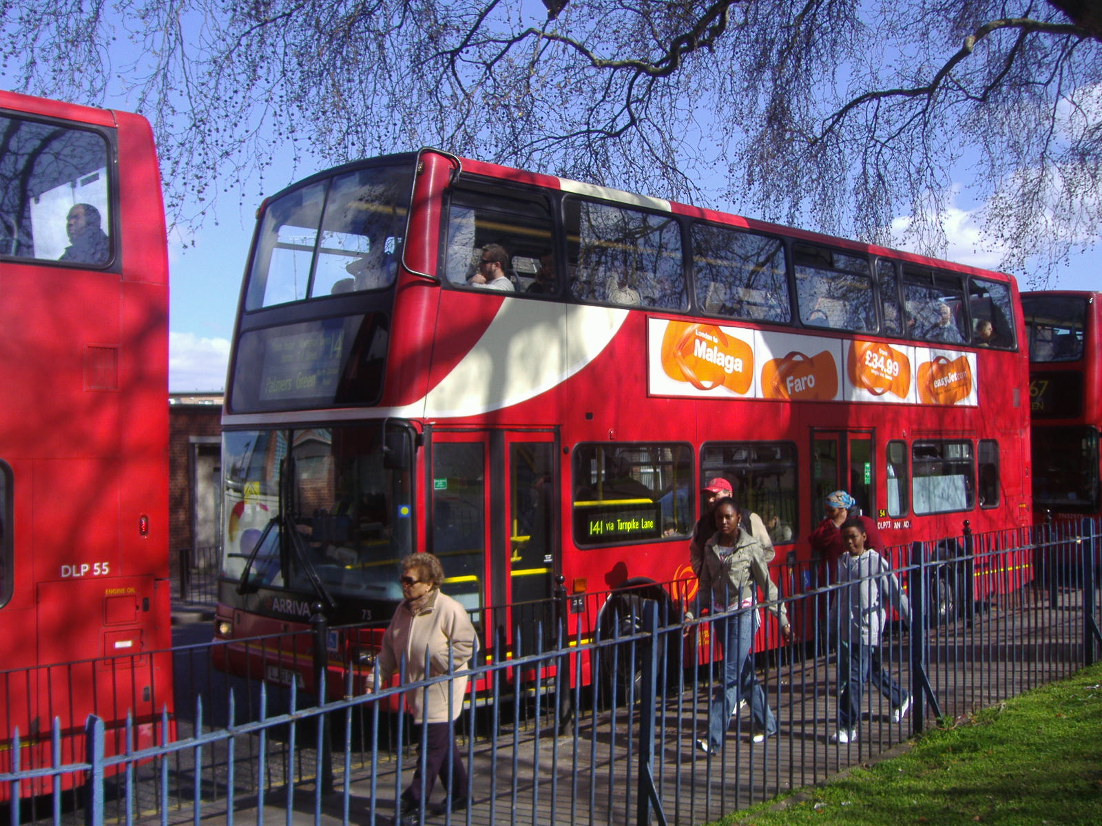 141 Green Lanes1